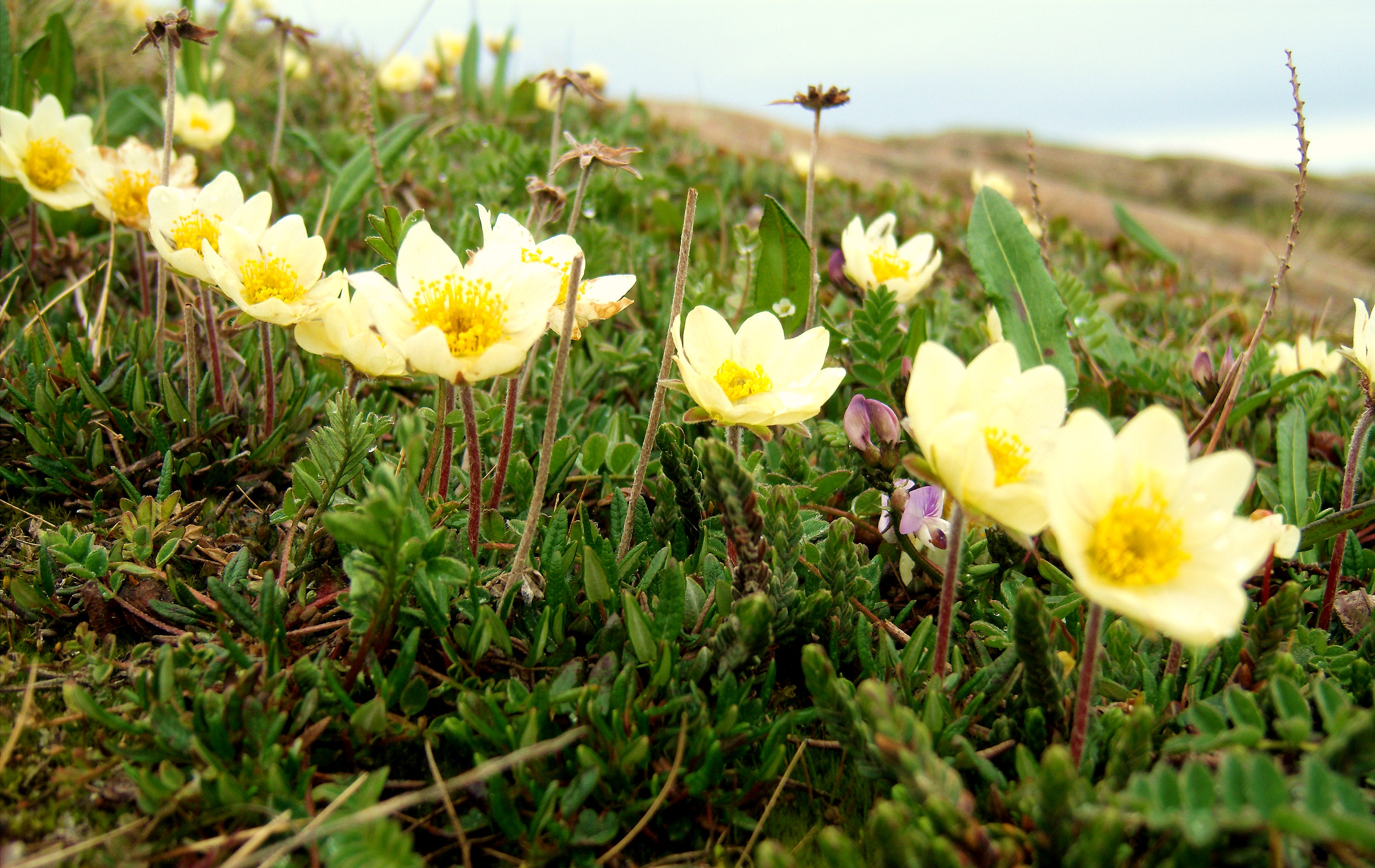 GEDC6869